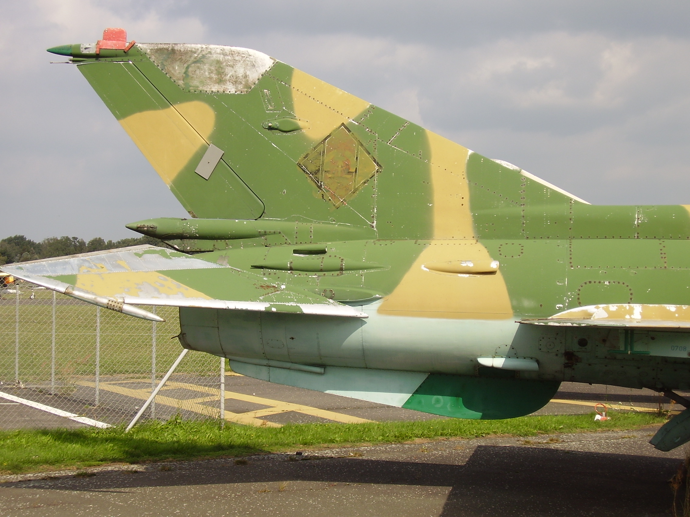 Luftwaffenmuseum der Bundeswehr; Airforce Museum of the Bundeswehr; Berlin-Gatow, MiG-21M